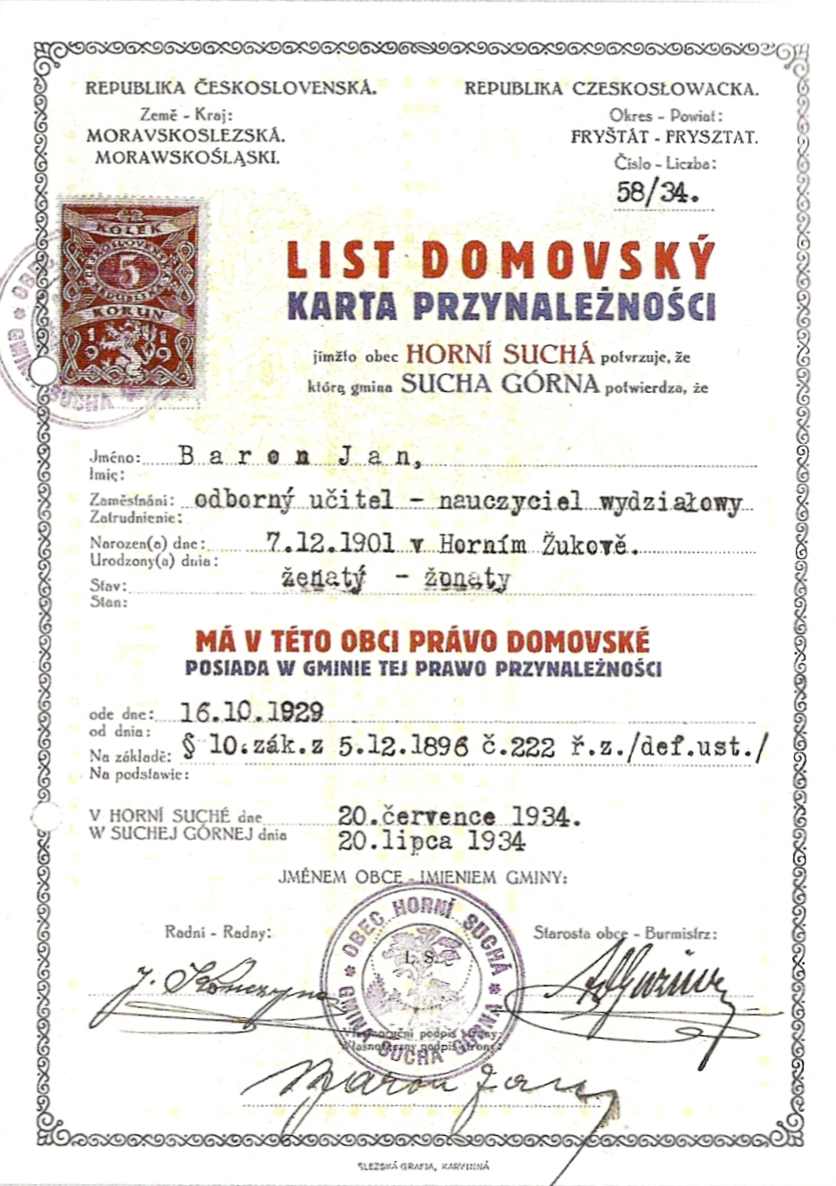 Domovský list Jana Barona z roku 1934, který potvrzoval domovské právo Barona